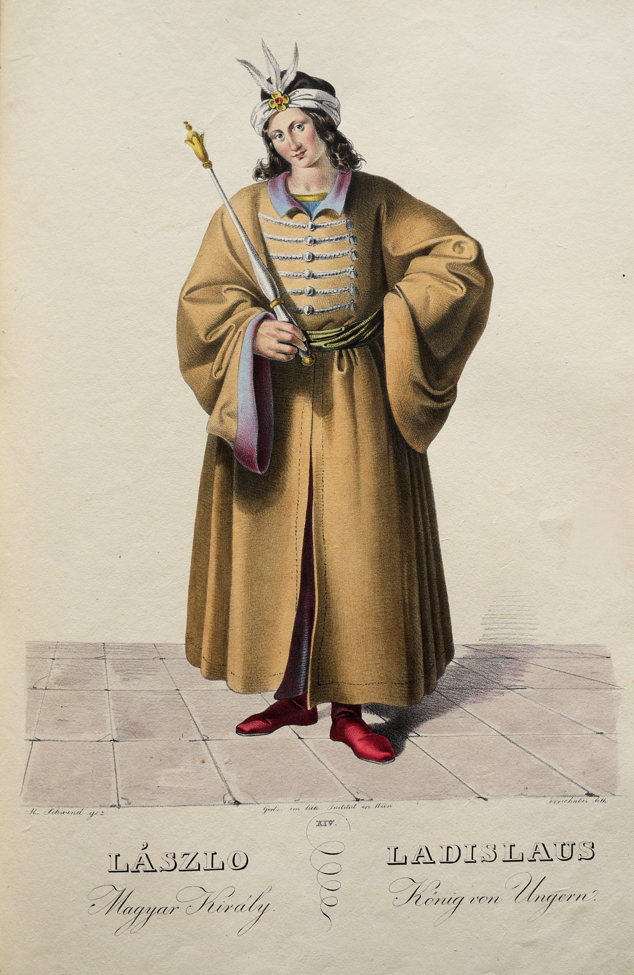 Ladislaus II. (1131-1163König von Ungarn etc. Lithographie von Josef Kriehuber nach einer Zeichnung von Moritz von Schwind aus Ungerns Erste Heerführer Herzoge und Koenige In einer Reihe von Bildnissen von Bela bis auf Seine Majestät Franz I. Kaiser Von Österreich König Von Ungern &c., &c. Wien : Lithographisches Institut ;ca. 1828.